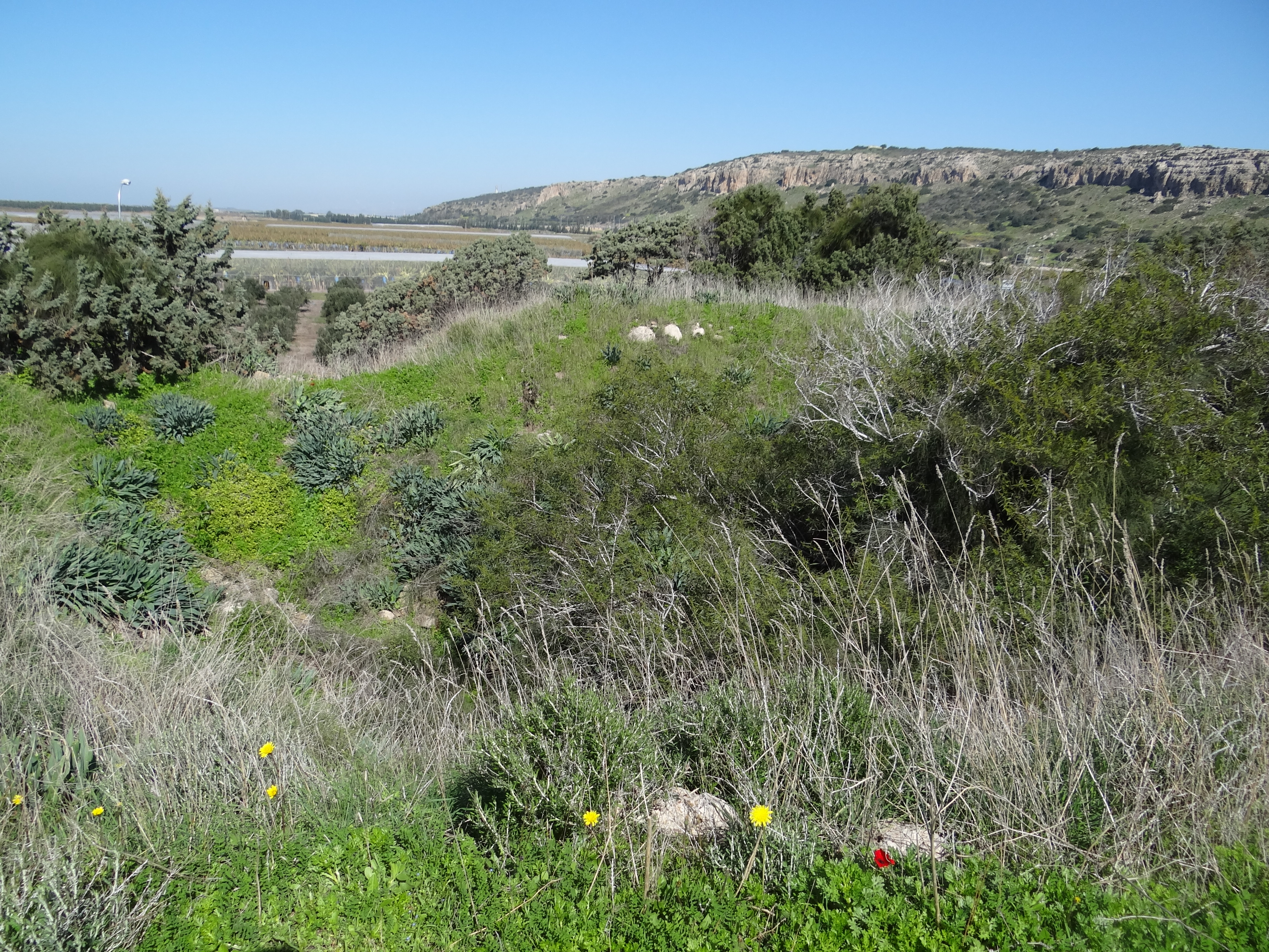 Tel Mevorach, Archaeology sitein Israel near Nahal Taninim תל מבורך הוא תל קטן השוכן על הגדה הדרומית של נחל תנינים בכניסה ליישוב בית חנניה. בחפירות הארכאולוגיות באתר נמצאו שרידים מתקופת הברונזה התיכונה, תקופת הברונזה המאוחרת, תקופת הברזל, התקופה הפרסית ומעוט שרידים מהתקופה ההלניסטית עד הערבית המאוחרת.